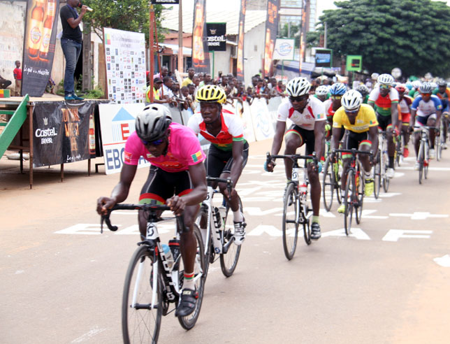 Les cyclistes provenant de plusieurs pays africains et africains ont participé au tour du Bénin.